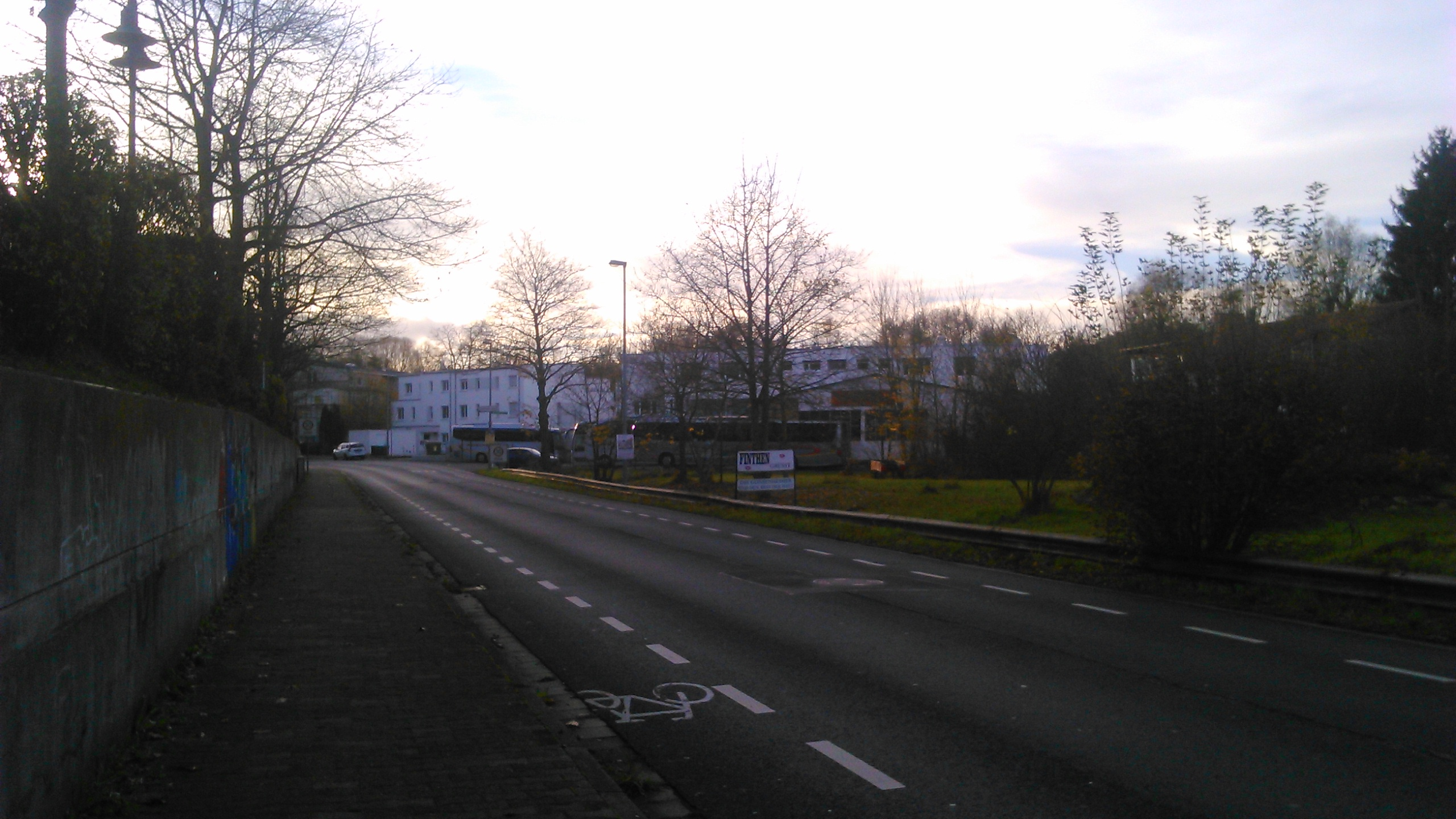 Einfahrt nach Finthen aus östlicher Richtung